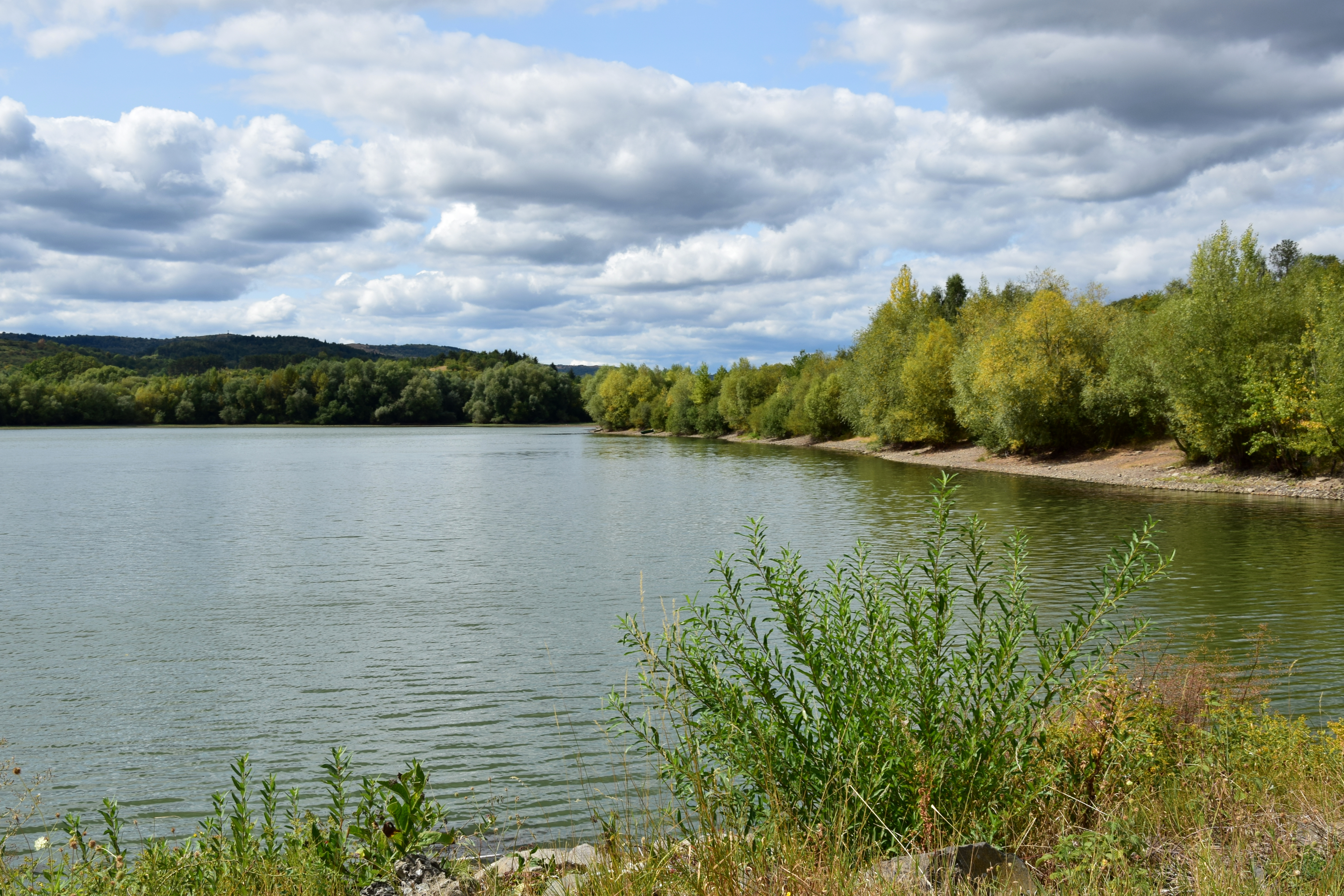 Rybník Sedlec – severní strana